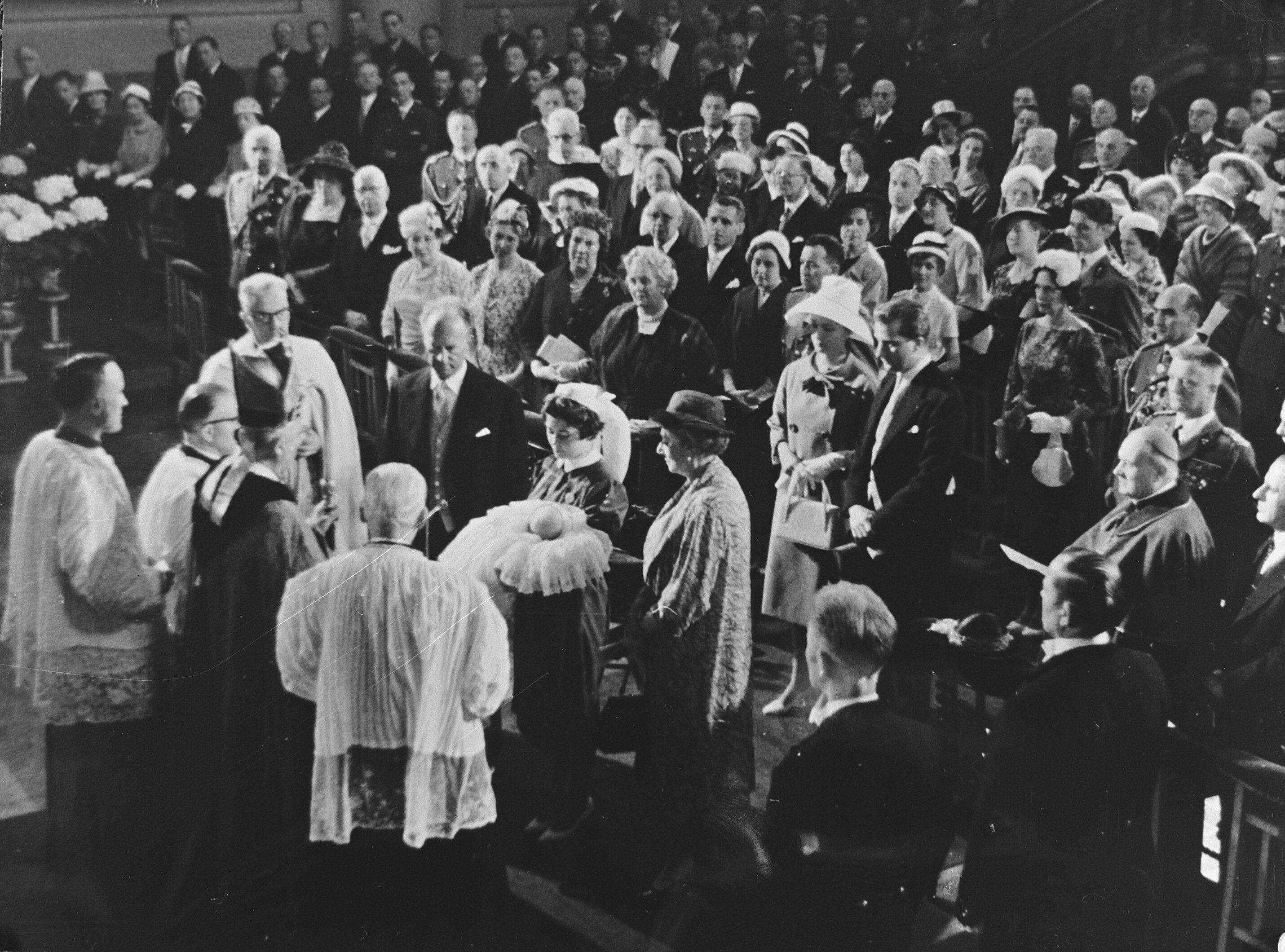 Collectie / Archief : Fotocollectie Anefo Reportage / Serie : [ onbekend ] Beschrijving : Doop van Prins Philippe van Belgie Datum : 18 mei 1960 Locatie : België Trefwoorden : Doopplechtigheden Persoonsnaam : PHILIPPE PRINS Fotograaf : Fotograaf Onbekend / Anefo Auteursrechthebbende : Nationaal Archief Materiaalsoort : Glasnegatief Nummer archiefinventaris : bekijk toegang 2.24.01.09 Bestanddeelnummer : 911-2632